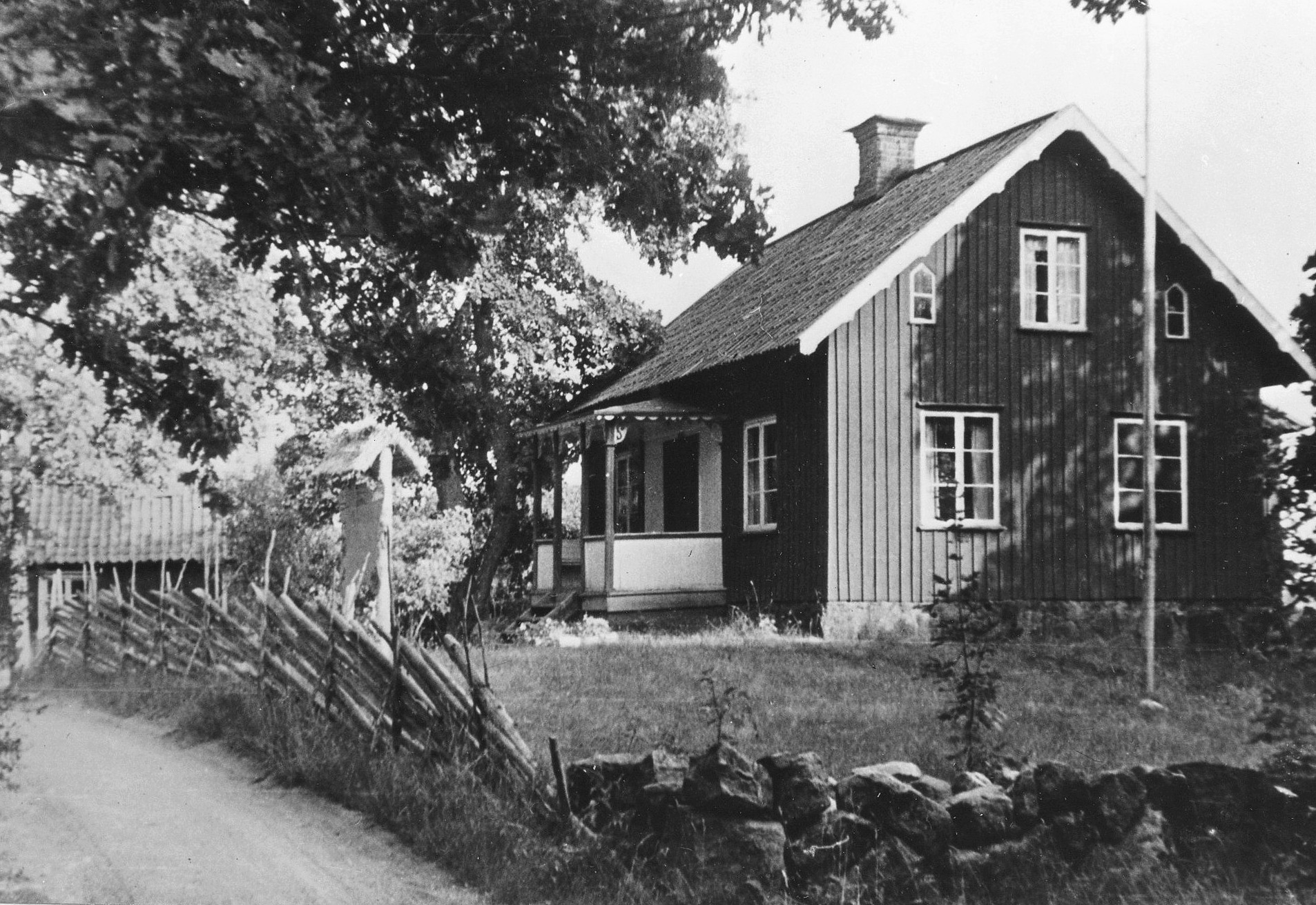 Bredängs gård (revs 1963-64)